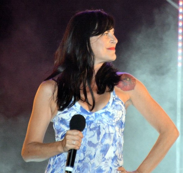 Lio au concert "La Folie des années 80" à Enghien-les-Bains